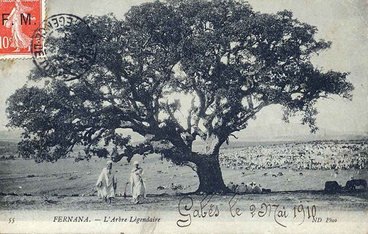 Fernana (Tunisie) - l'arbre légendaire.